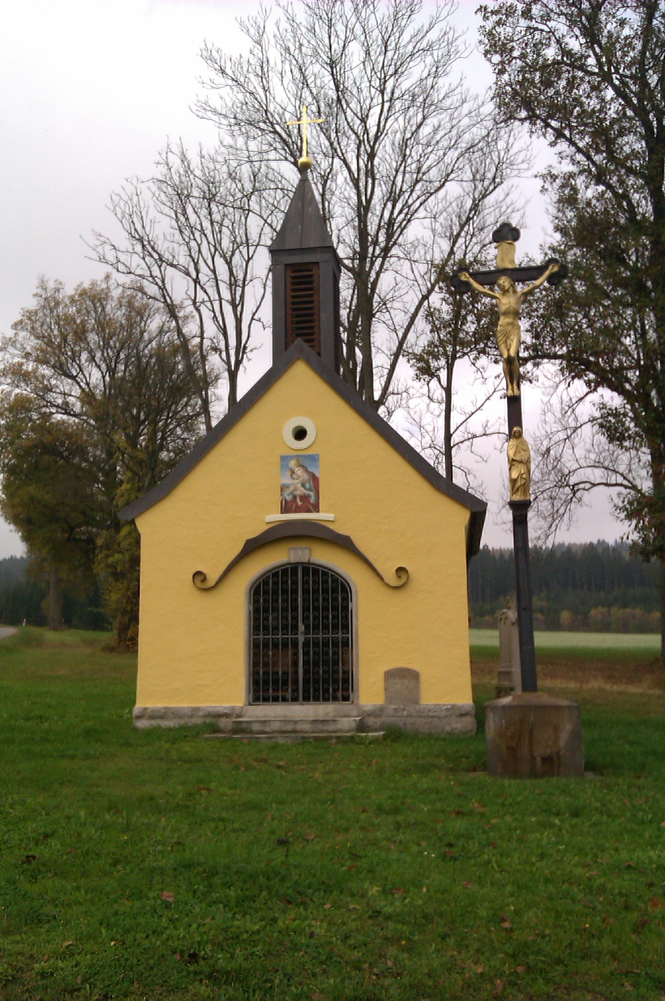 Großes gusseisernes Kreuz bei der Kapelle bei Peugenhammer